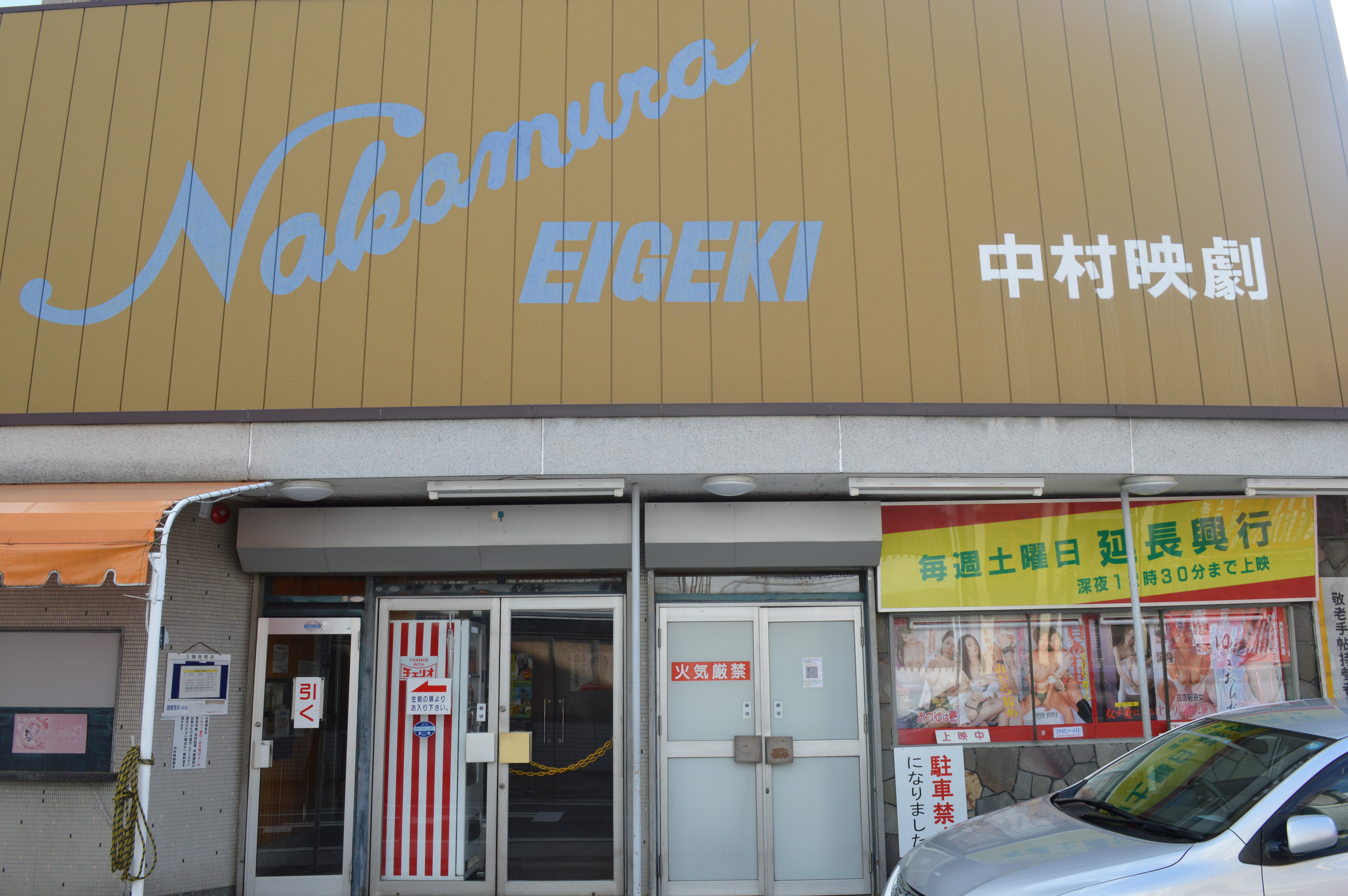 愛知県名古屋市中村区の映画館「中村映劇」（成人映画館）。